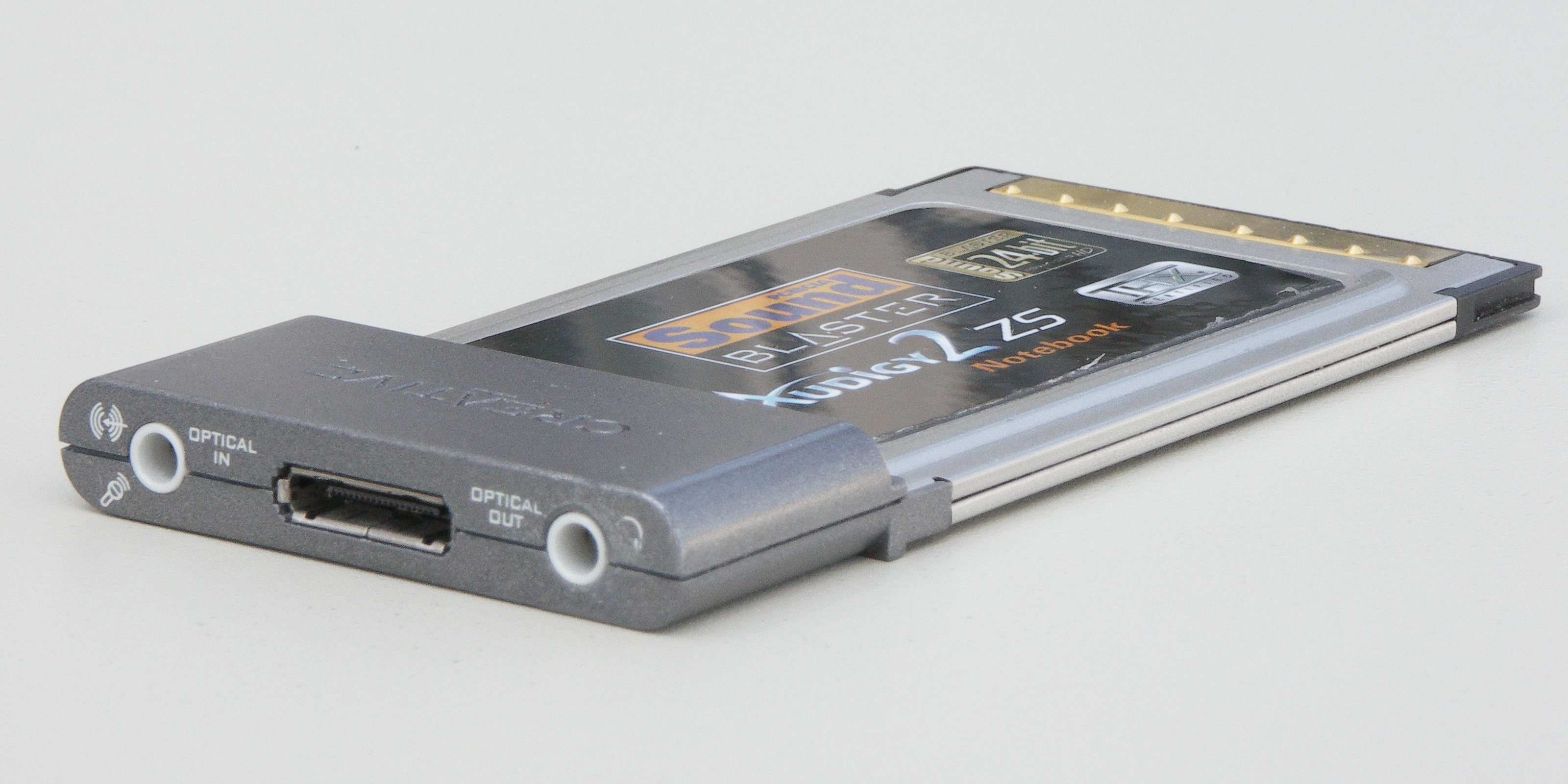 Soundkarte Sound Blaster Audigy 2 ZS Notebook des Herstellers Creative Labs für einen PC-Card-Steckplatz, mittig der Anschluss für einen Adapter auf drei Klinkenstecker zur Speisung von Verstärkern oder aktiven Lautsprechersystemen (auch 5.1-Surround-Sound)